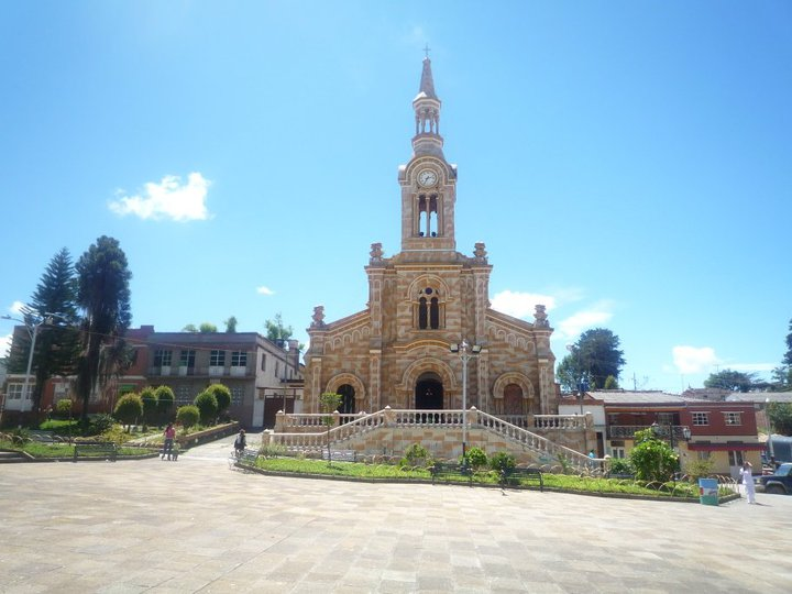 Parroquia Virgen Del Carmén en Bolívar Santander